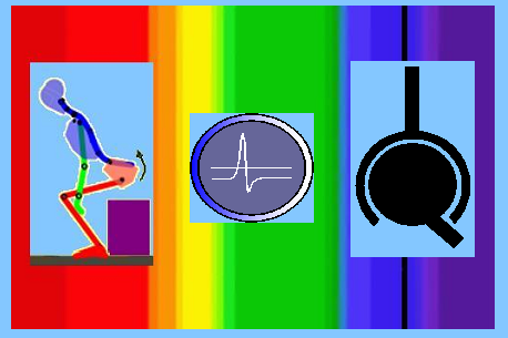 Composition par rapport à des fichiers Commons en licence libre pour servir de pictogramme au département de Biophysique de la Faculté Biologie de la Wikiversité. Le fond est l'Image:Spectre saphire.jpg, celle de gaucheest une des postures de l'Image:MmP22PosAlzarsi.png mise sur fond bleu.